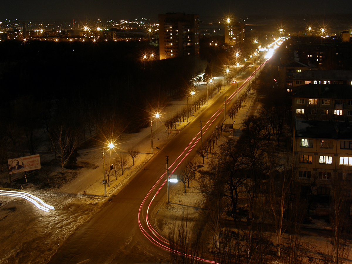 Краматорск